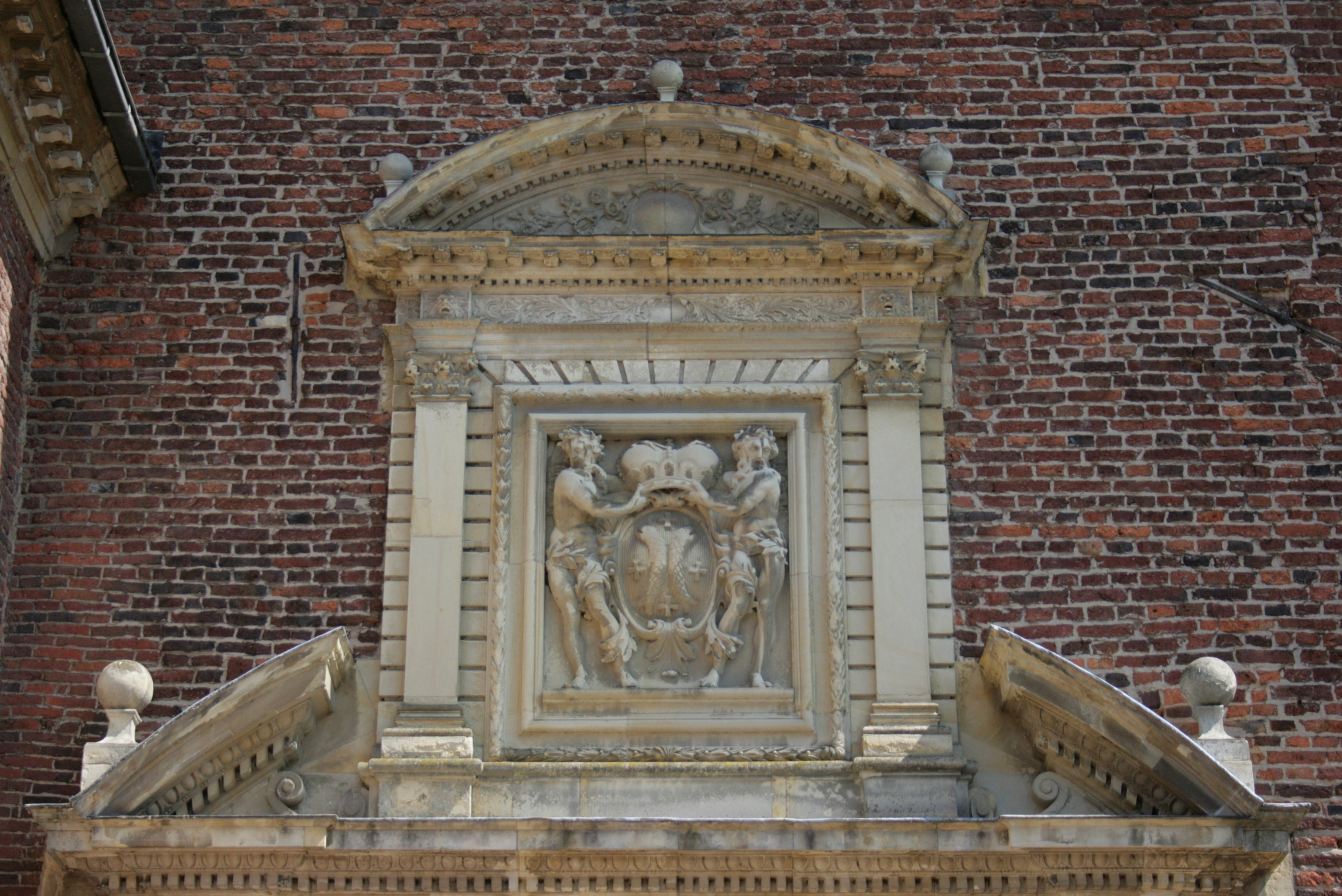 Wasserburg Anholt in Anholt, Isselburg